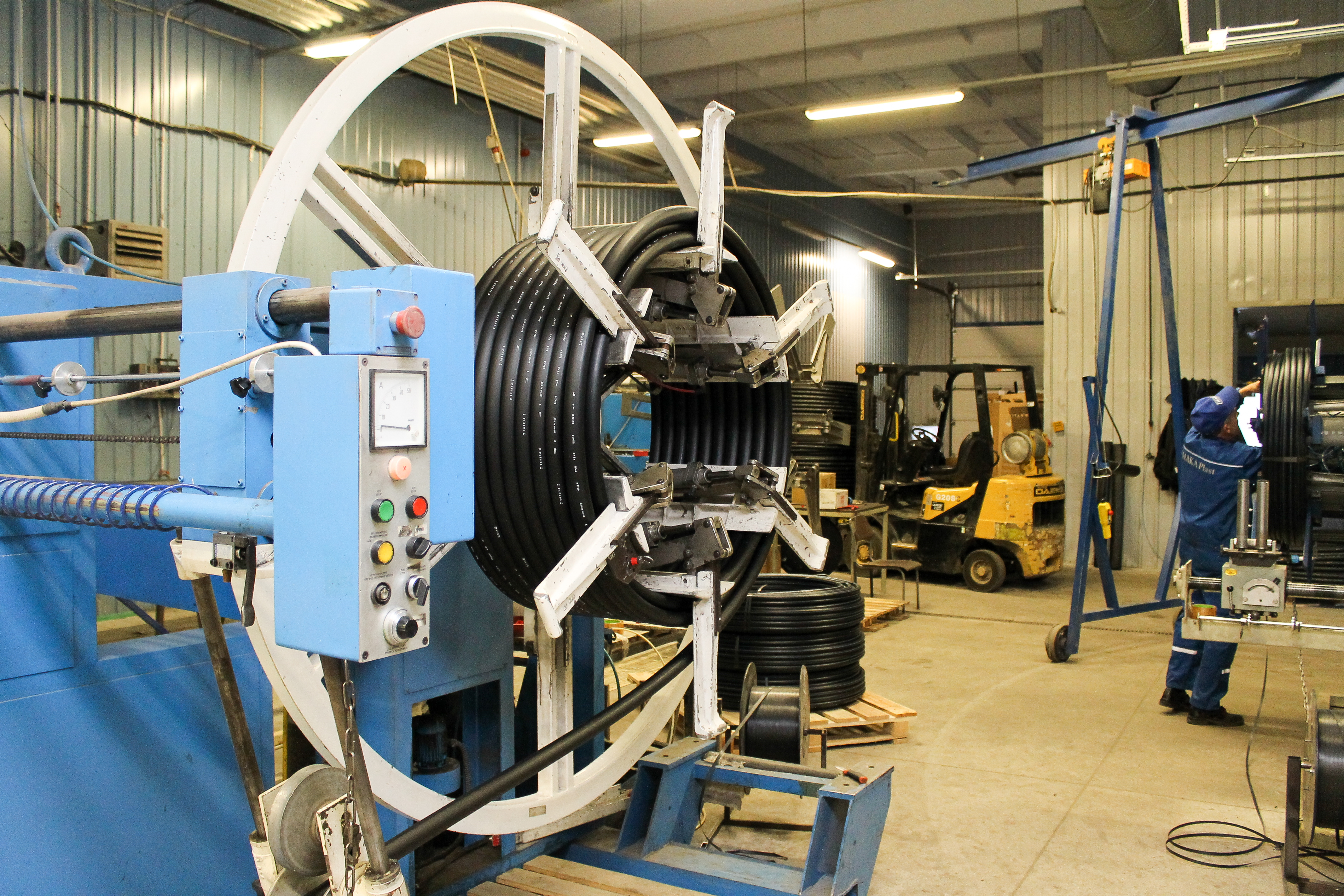 Haka Plast